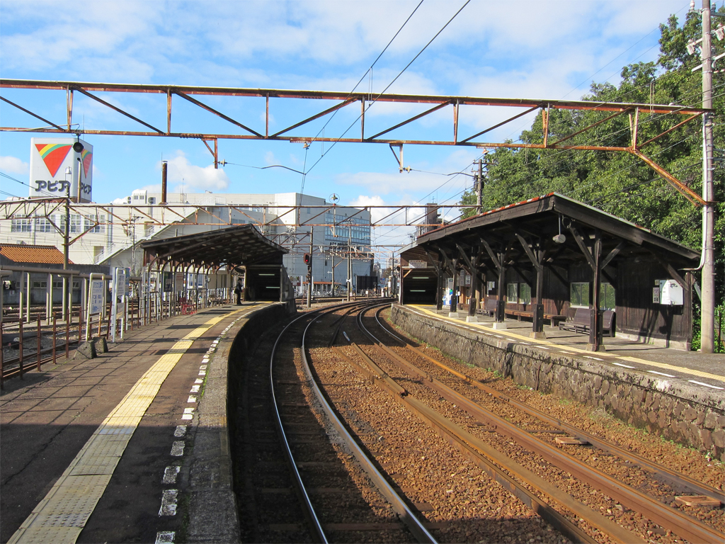 富山地方鉄道稲荷町駅 本線ホーム